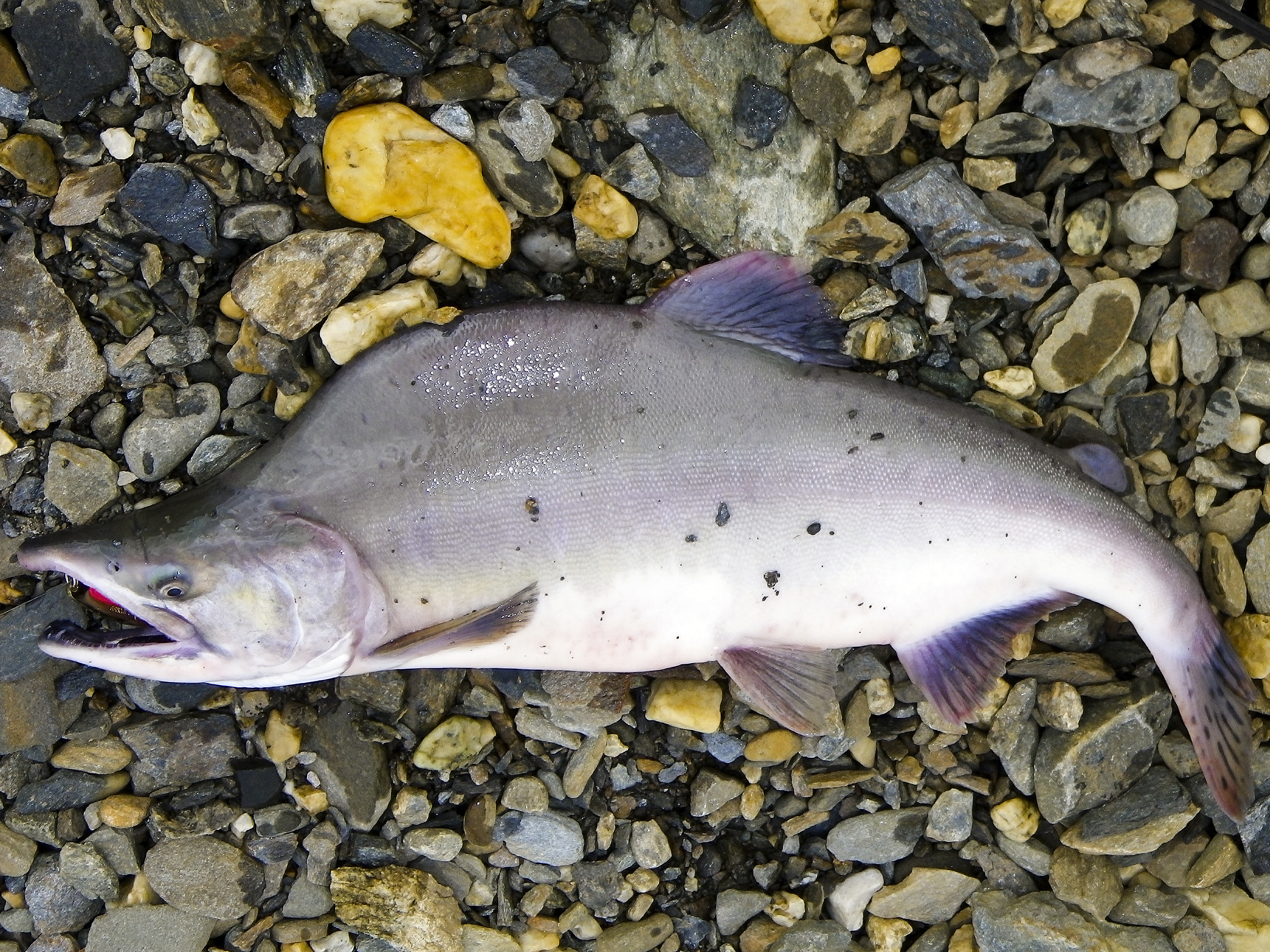 Pink Salmon (3)editresize